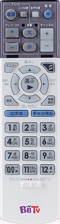 投稿者自身による作品